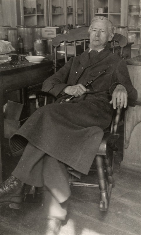 Norsk (bokmål): Georg Ossian Sars, portrett, mann, zoolog, professor, sittende helfigur.